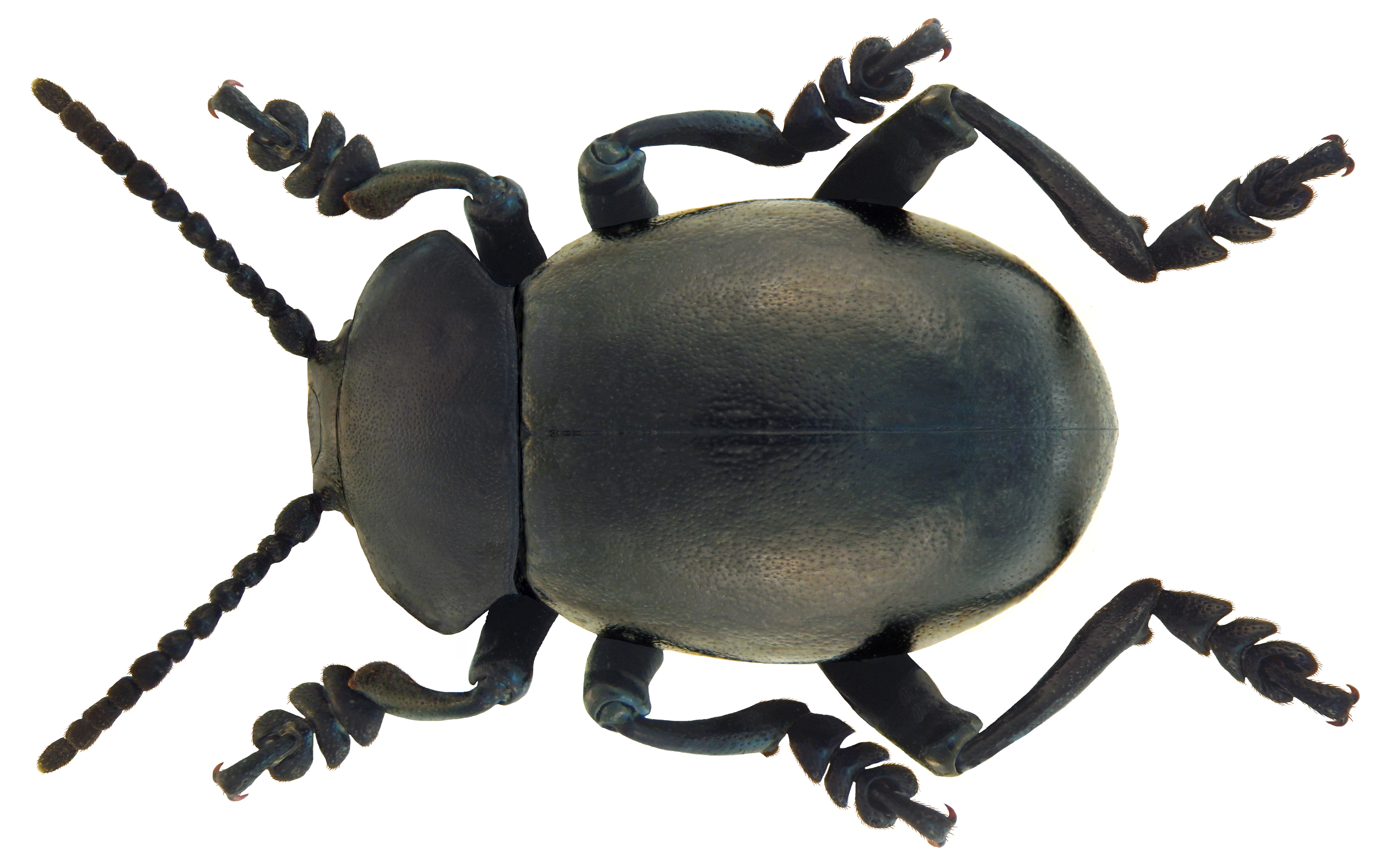 Timarcha tenebricosa (Fabricius, 1775) male Familie: Chrysomelidae Groesse: 12-14 mm Verbreitung: Europa Oekologie: an Galium-Arten Fundort: Germnaia, Bayern, Unterfranken, Würzburg, Winterhausen leg. H.J.Mager, 1974; det. U.Schmidt Photo: U.Schmidt, 2010